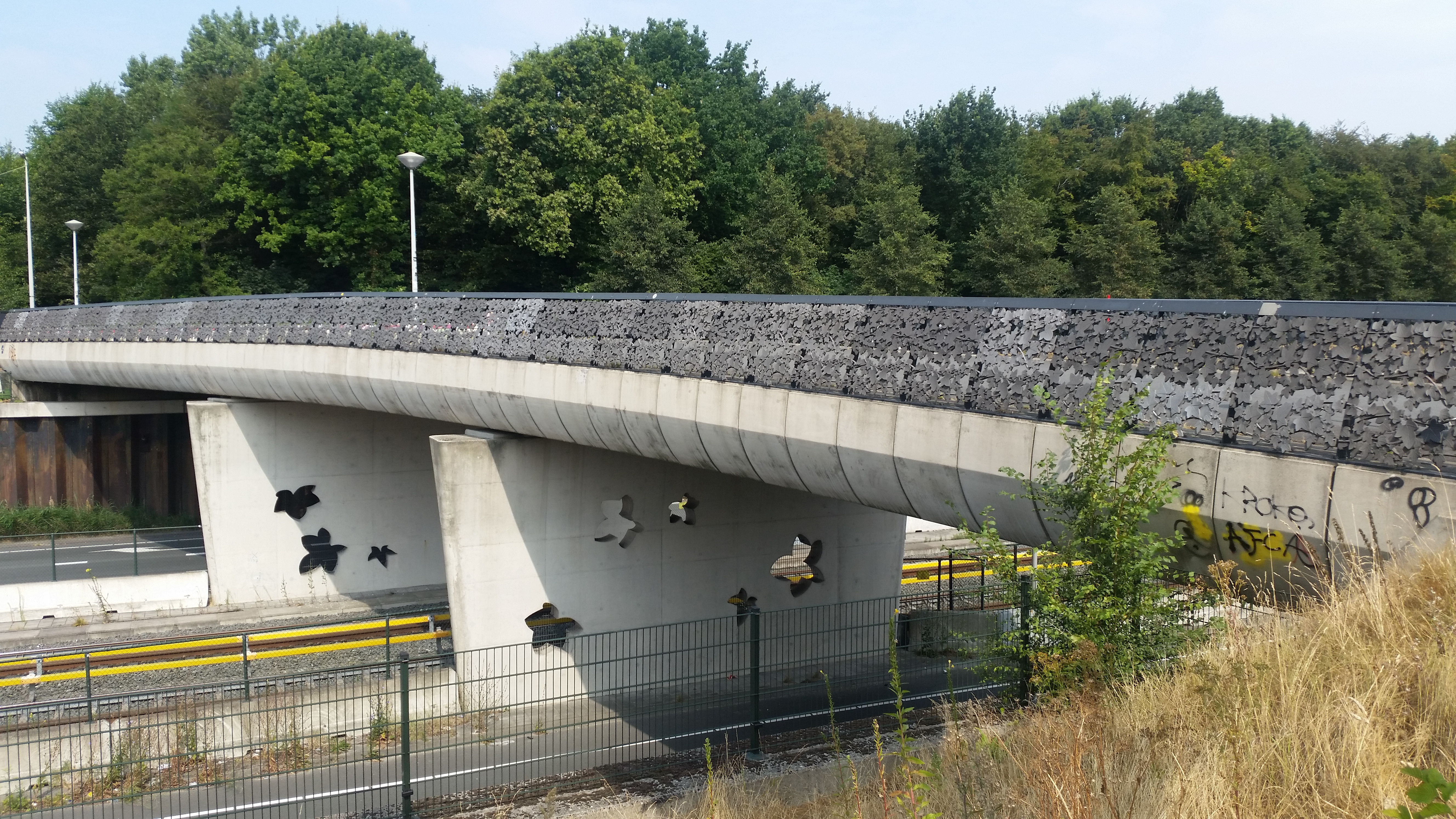 Impressie van de Hederabrug, Amsterdam-Noord (juli 2018)